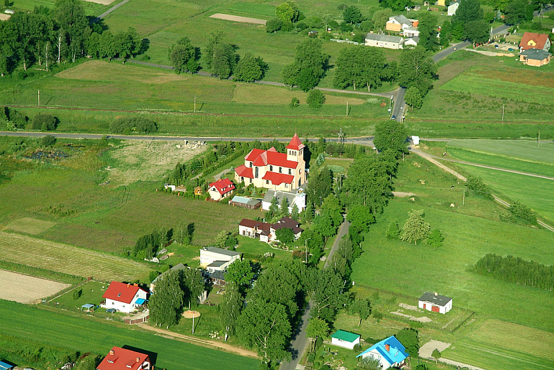 Kościół w Żukowie